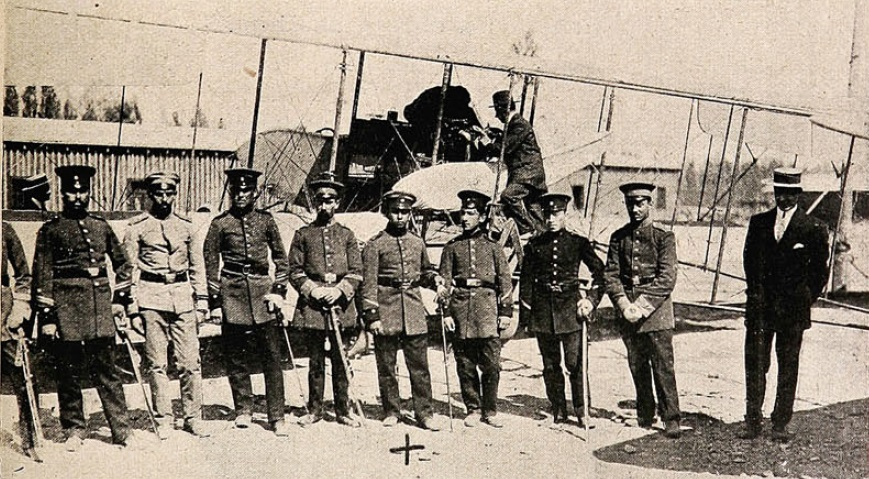 El cuerpo de aviadores militares al que pertenecía el Sangento Ménadier.